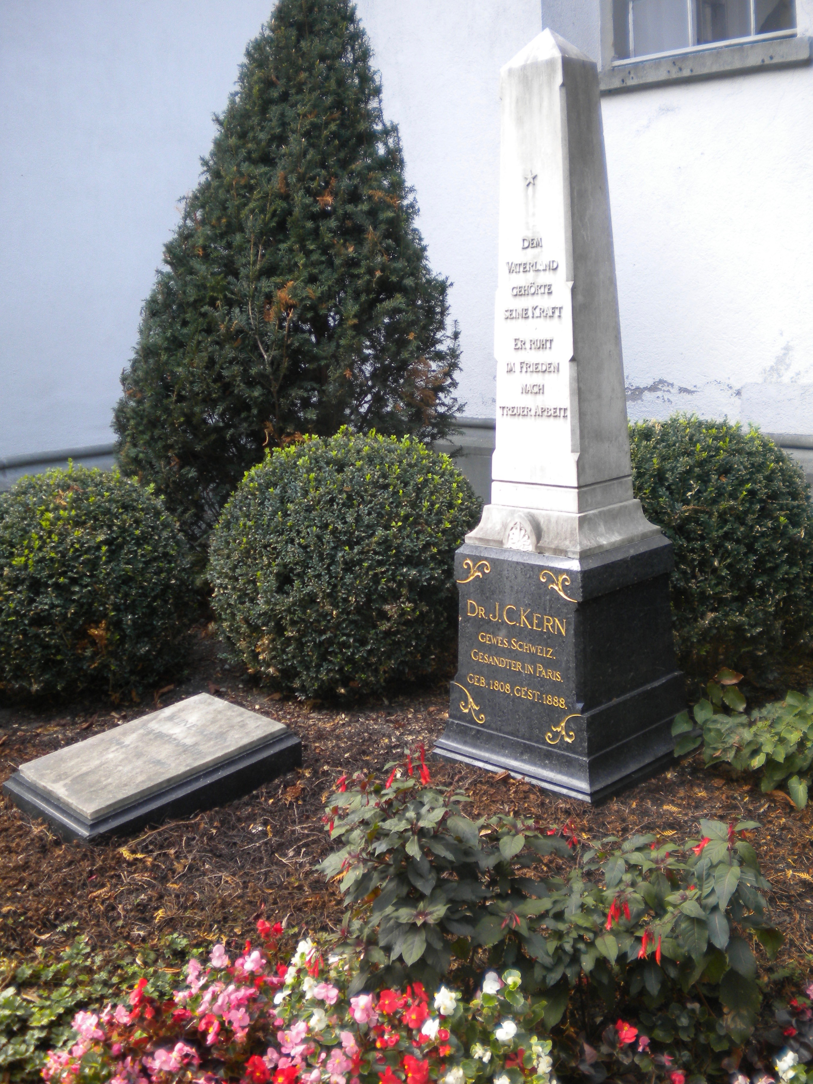 Vor der Kirche Berlingen befindet sich die Grabstätte Johann Konrad Kerns und seiner Gattin